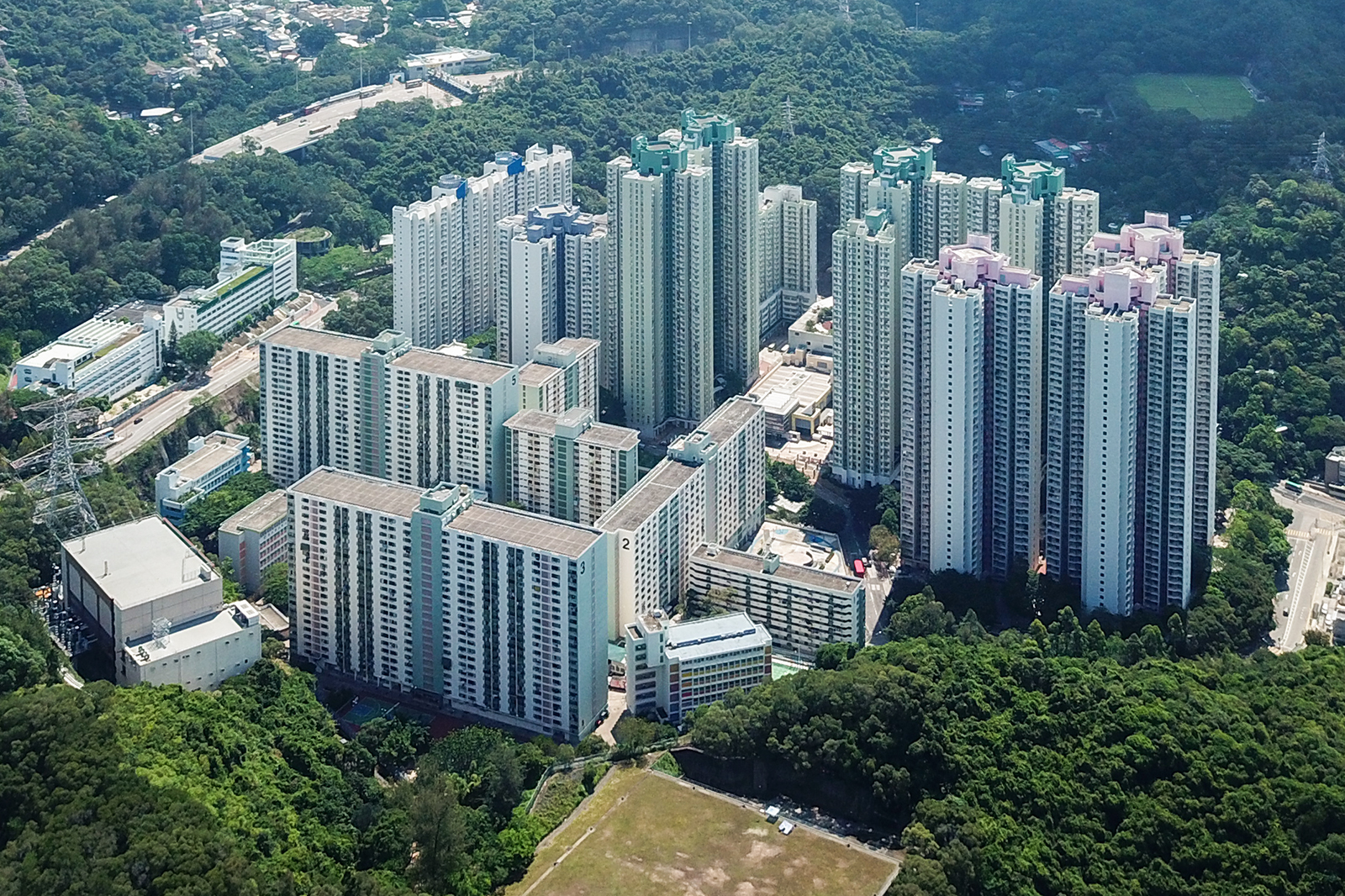 Lei Muk Shue Estate